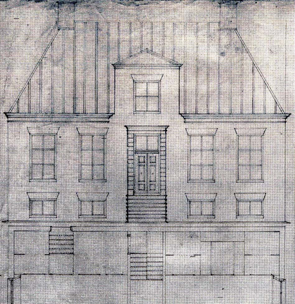 Bouwtekening van het Grevijlinkhuis in Annerveenschekanaal